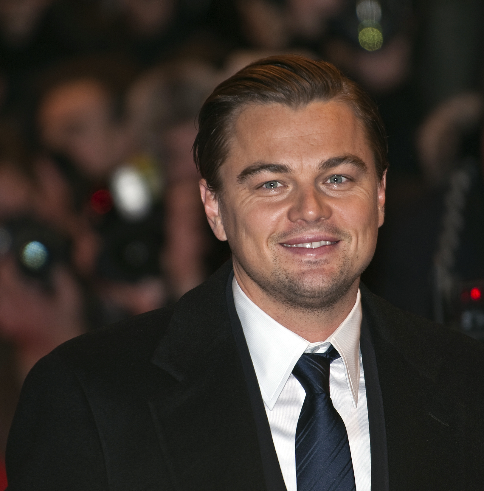 Leonardo DiCaprio crop 2010